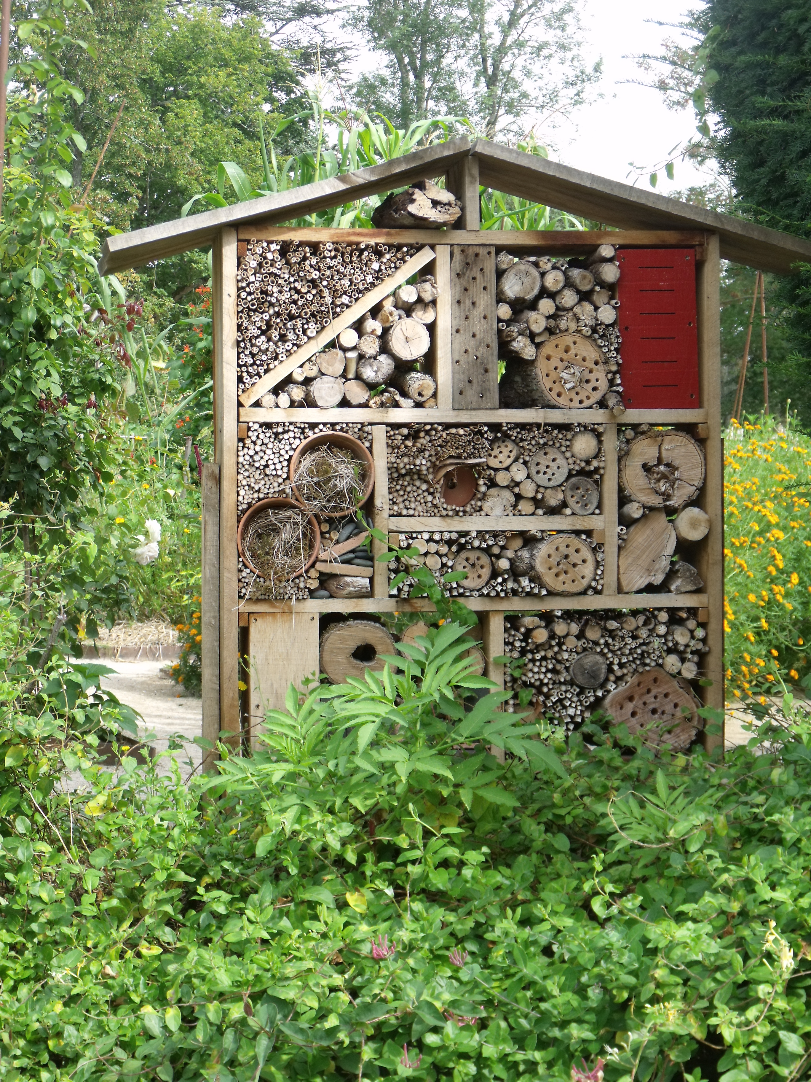 photo prise au festival des jardins de Chaumont-sur-Loire